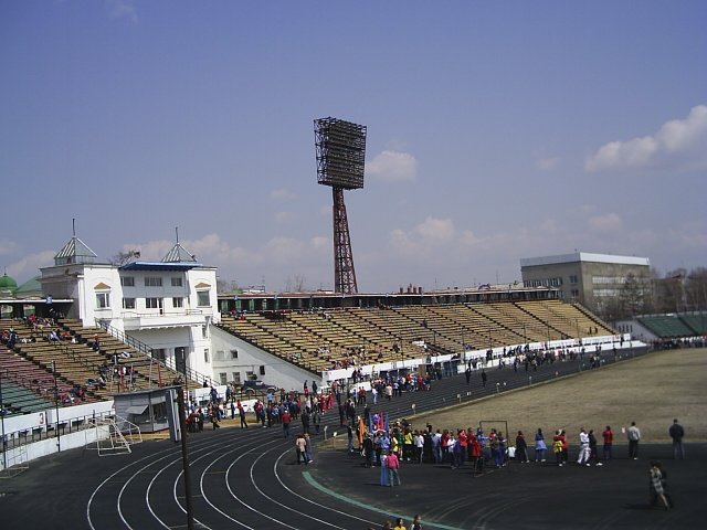 город Иркутск, Иркутская область, Россия. Снимки мая 2005 г.